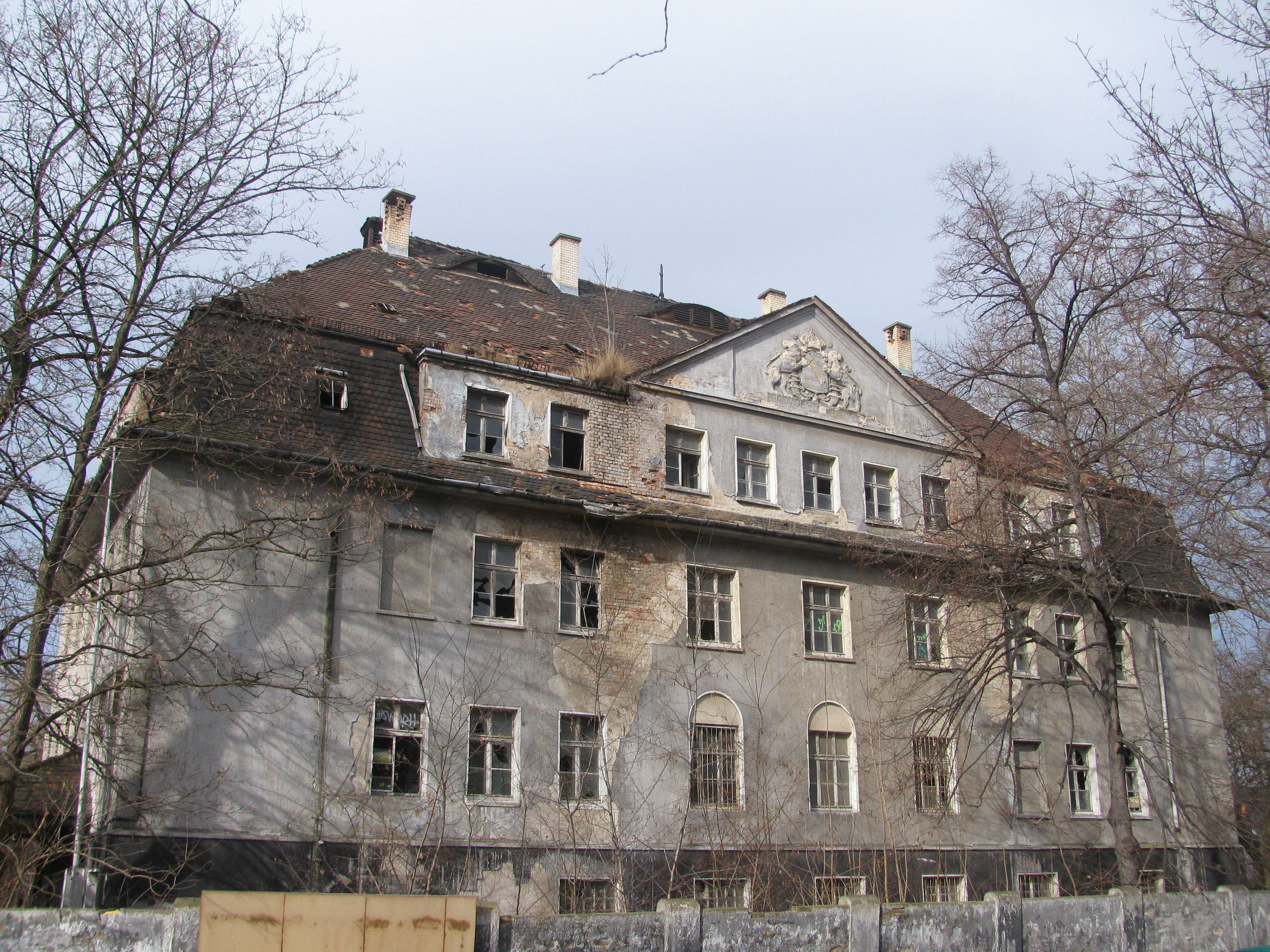 Kaserne Übigau, Dresden, graues Kasernengebäude an der Klingerstraße